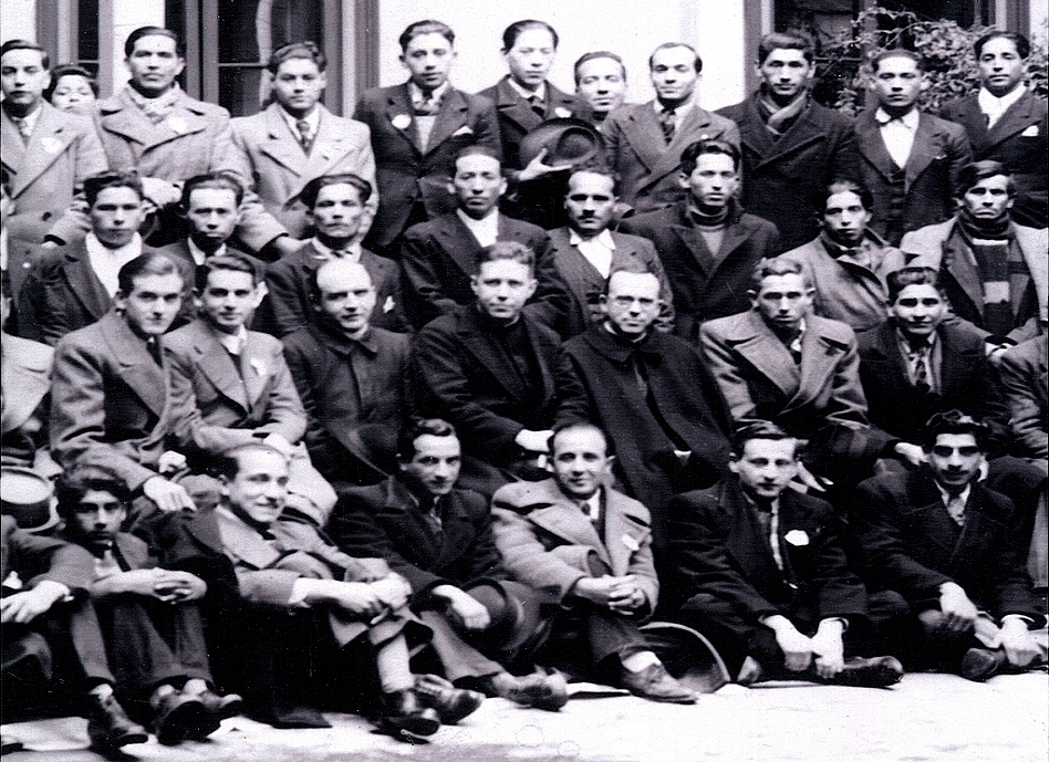 Foto grupal, retiro con Padre Hurtado en Valparaíso, 1937. Aparecen en la fotografía: Sergio Stone Valenzuela, Oscar Ruiz Tagle, Sergio Eastman, Fabio Vico Valdivieso, Jorge Barzuri, Raúl Cereceda y William Thayer.